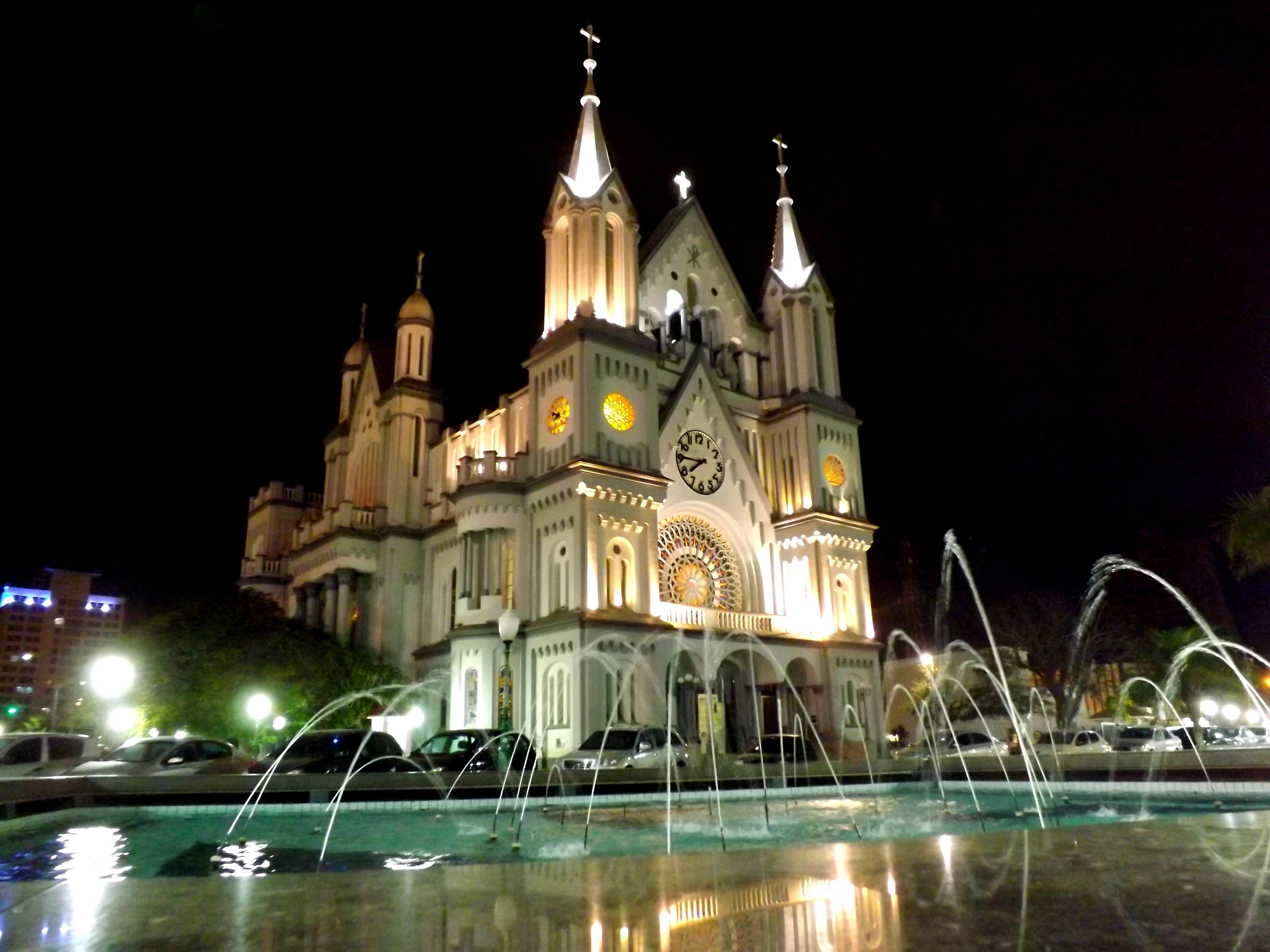 Igreja Matriz - Itajai